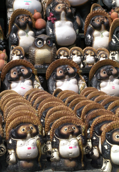 信楽焼 2005/5/21撮影 撮影者・提供者同じ